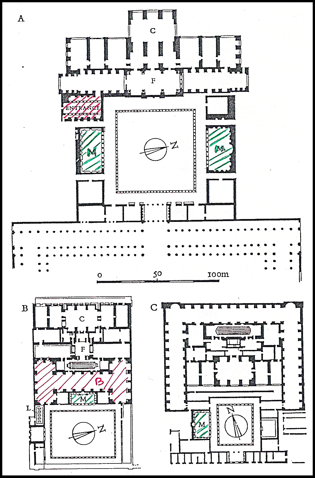 Plan comparés des principaux "thermes-gymnases" d'Ephèse, Izmir, Turquie.